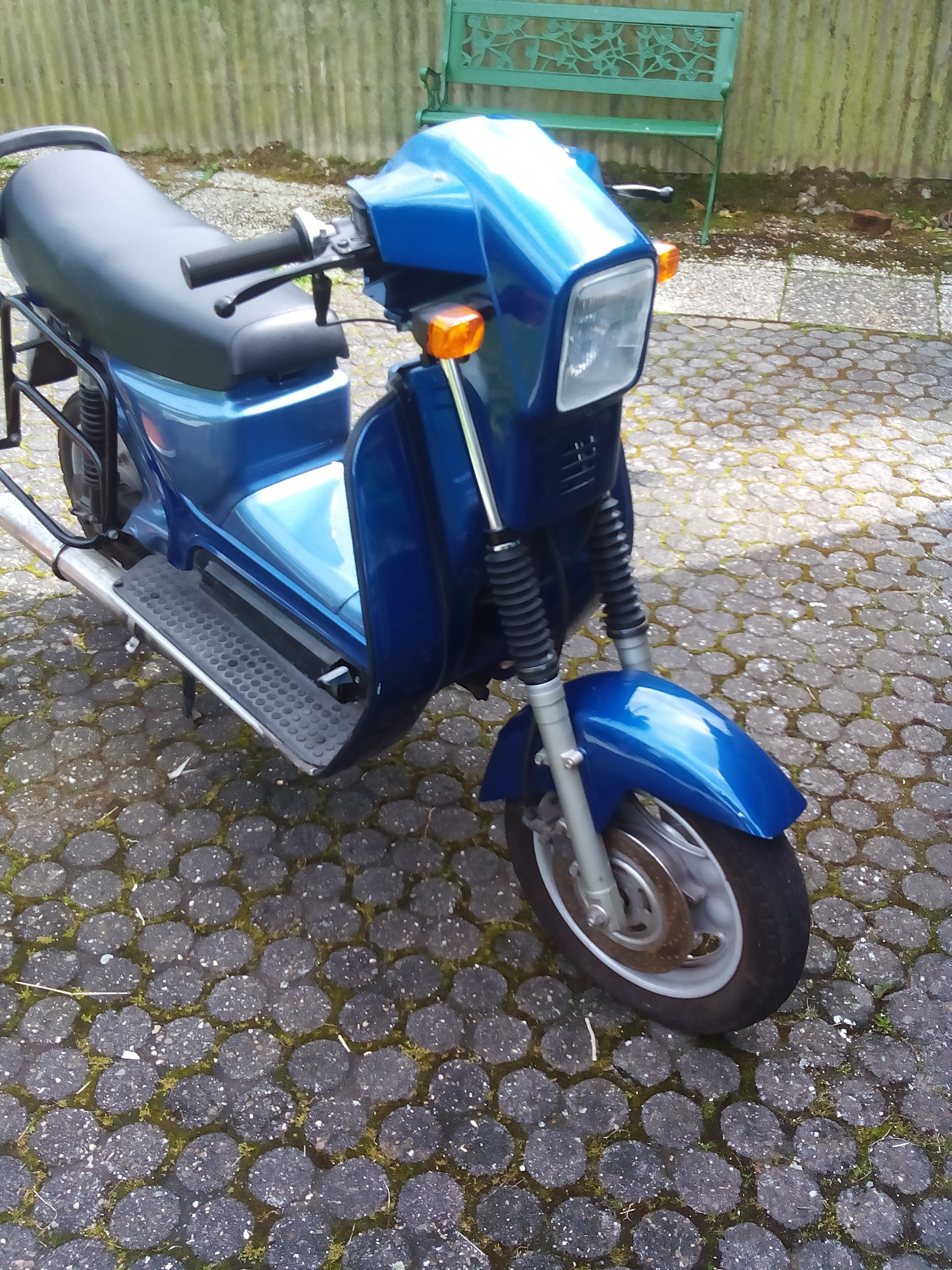 Simson SR50 CE